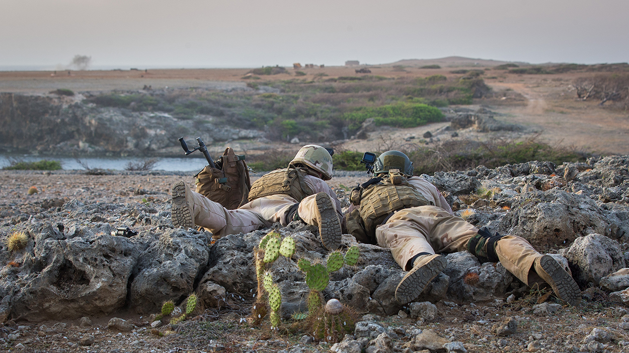 Landmachtcompagnie op Curaçao, de Bravo-compagnie van 12 Infanteriebataljon Luchtmobiel, gelegerd in Marinebasis Parera, oefent een tactisch vuurgevecht met scherpe munitie op oefenterrein Wacawa, Curaçao